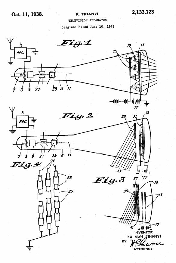 Tihanyi Kálmán egyik szabadalmi beadványának részlete